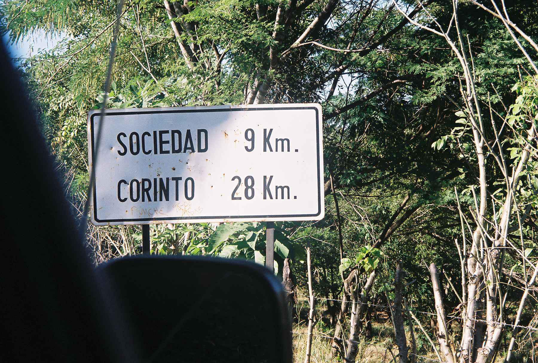 Road sign near Corinto and Sociedad, Morazán Province, El Salvador